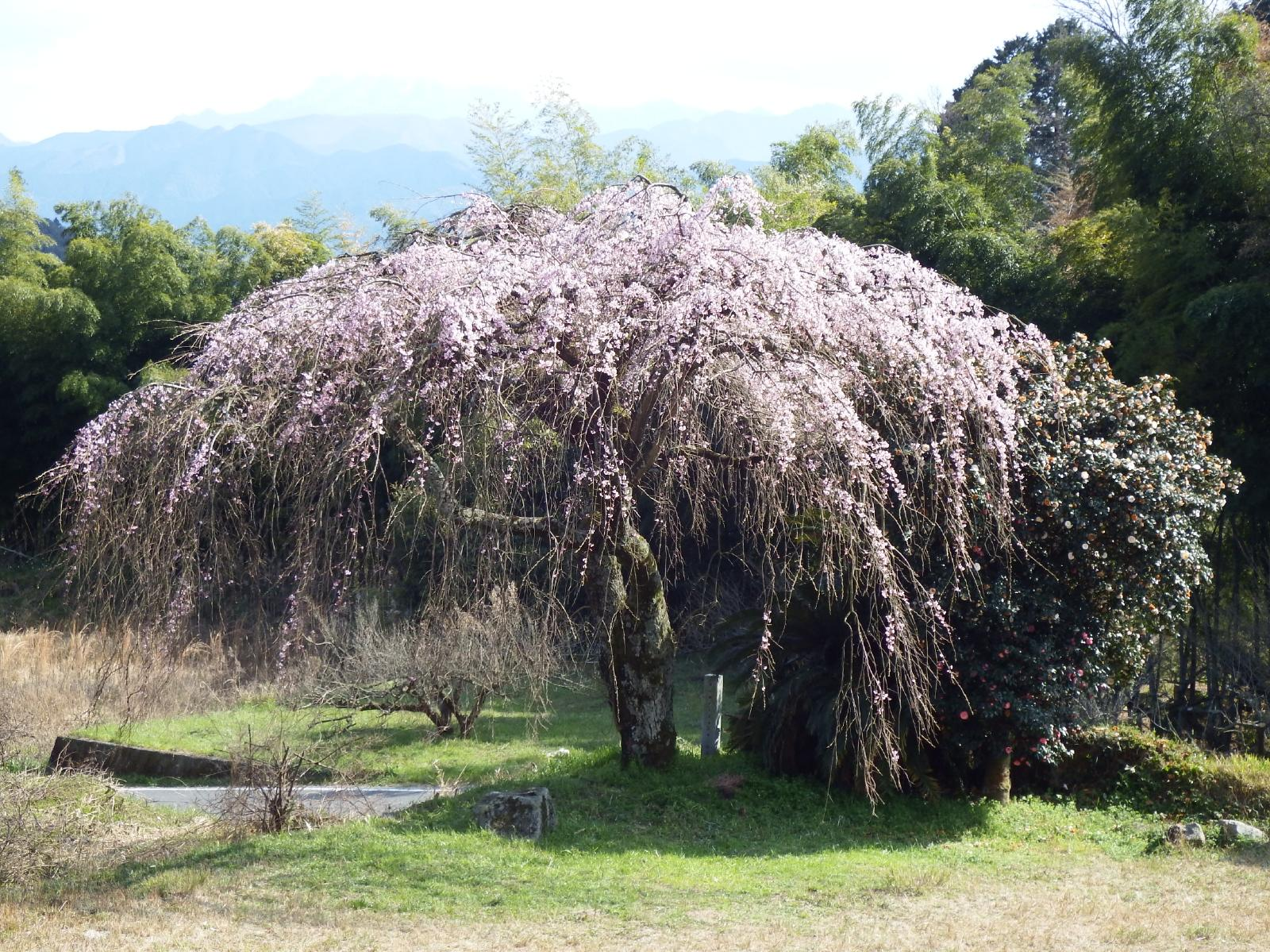 西山興隆寺の枝垂れ桜